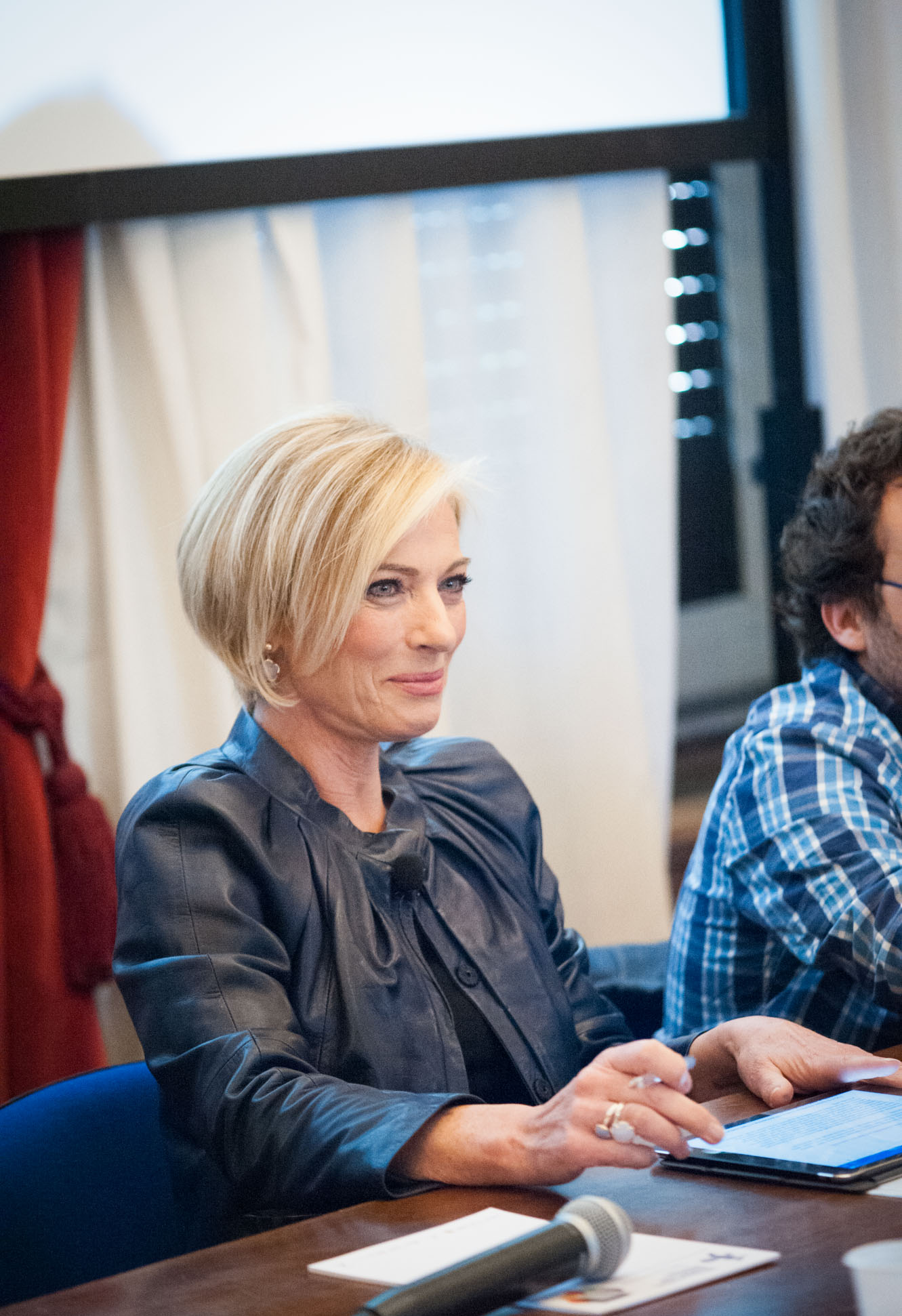 Maria Concetta Mattei lors du Festival international du journalisme 2017